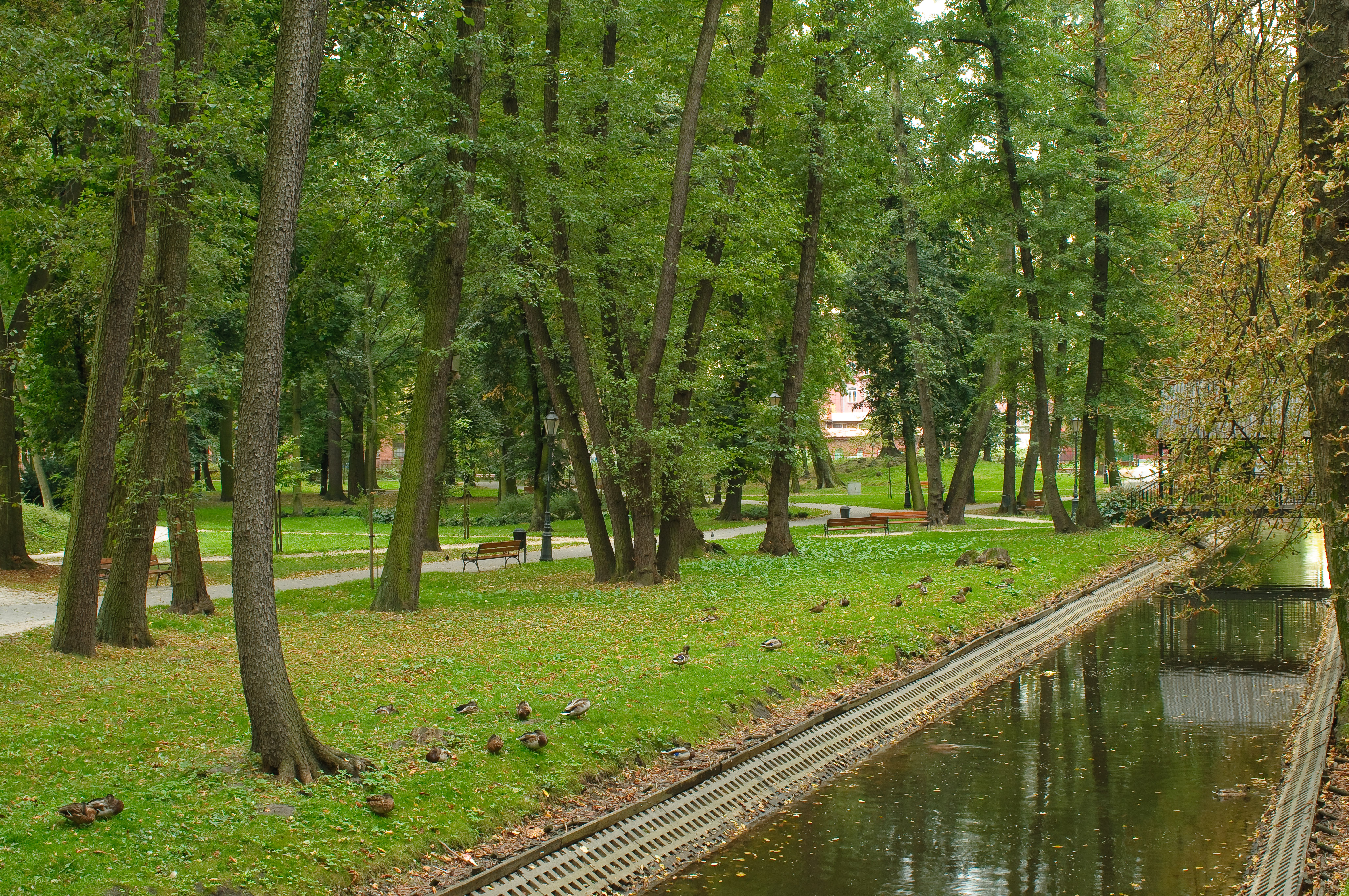 Żyrardów - park zespole pałacowym Dittricha, obecnie Park Miejski, kładka nad kanałem (zabytek nr 535 z 5.05.1980